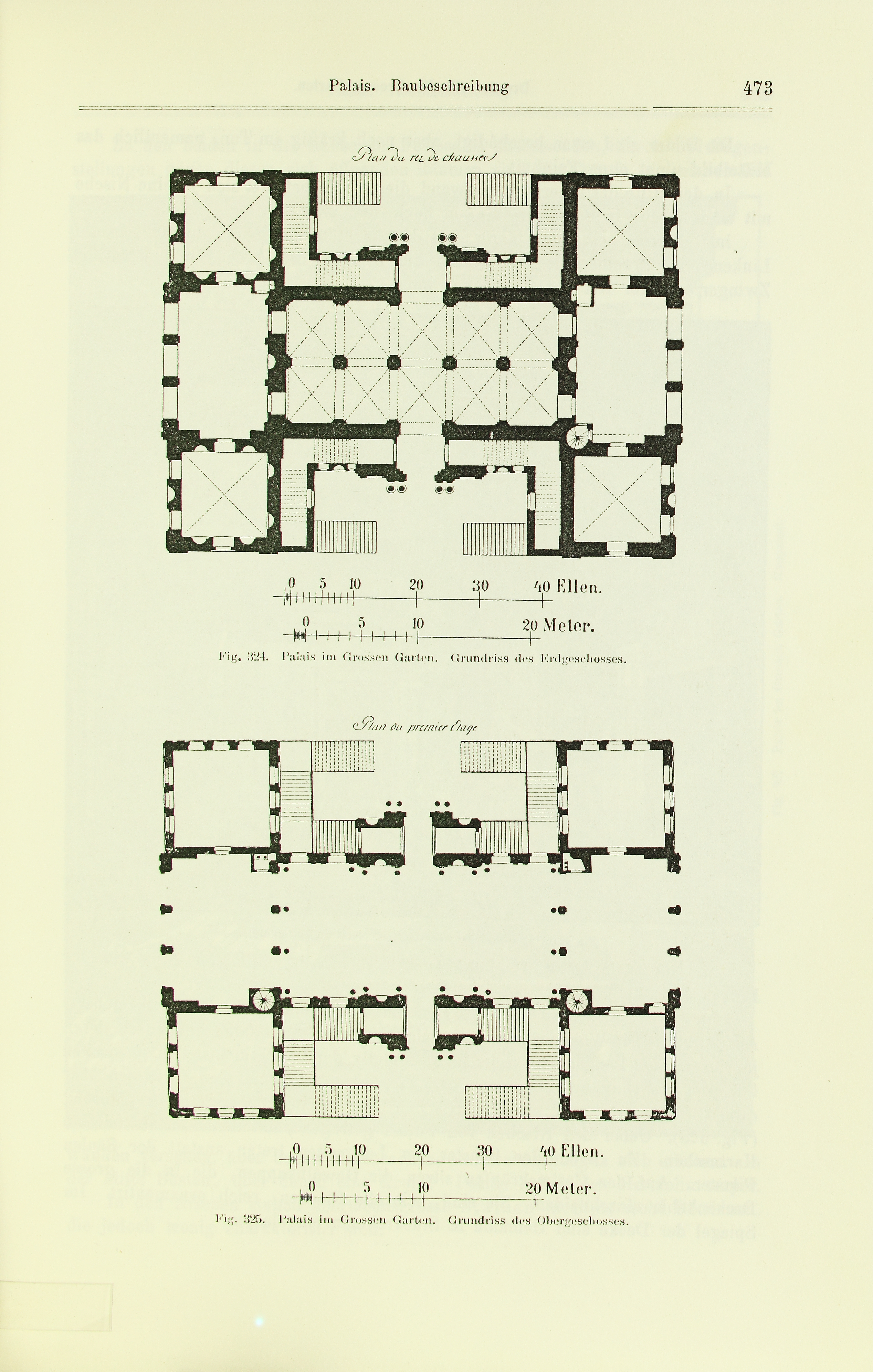 siehe Bildbeschreibung aus: Beschreibende Darstellung der älteren Bau- und Kunstdenkmäler des Königreichs Sachsen. 21, 22, und 23. Heft: Stadt Dresden Meinhold, Dresden 1903